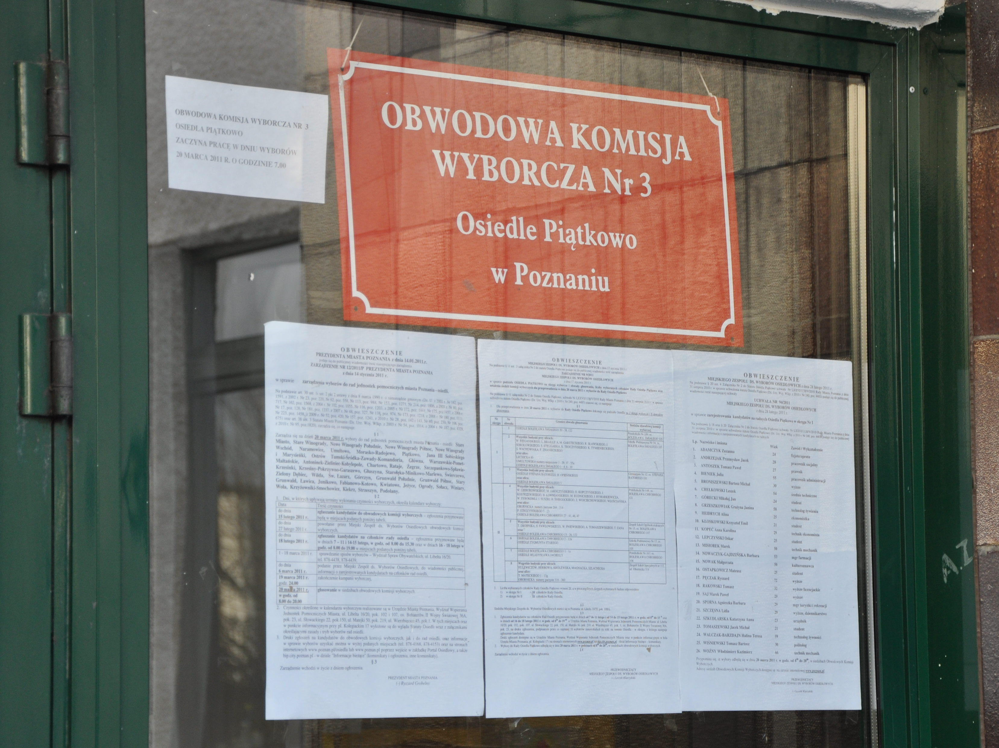 Tablica przy drzwiach do Gimnazjum Nr 12 (os. Stefana Batorego 101), będące siedzibą obwodowej komisji wyborczej 20 marca 2011 w wyborach do Rady Osiedla Piątkowo, Okręg Nr I, Obwód Nr 3